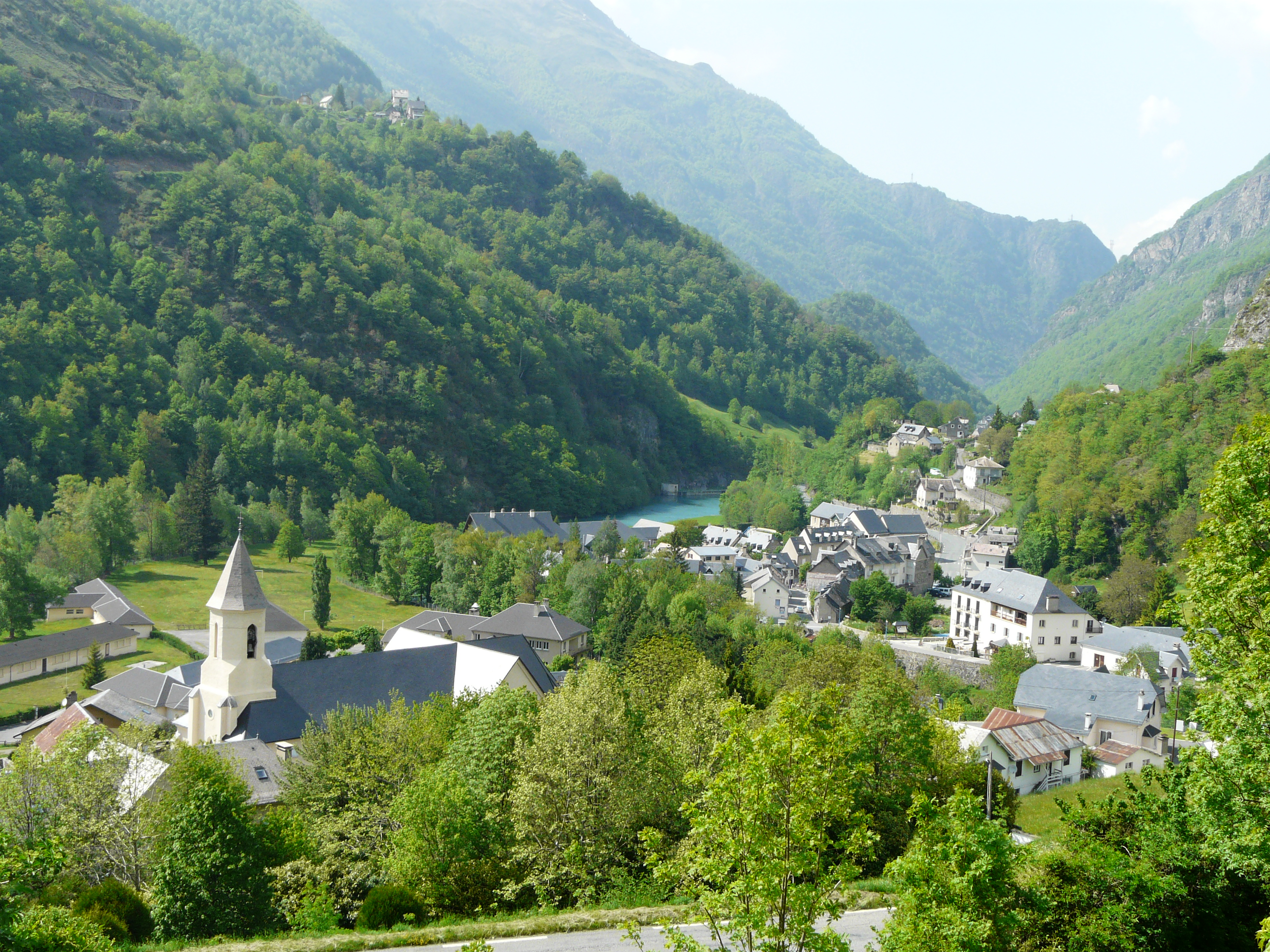 Le village de Gèdre et la vallée du gave de Gavarnie, Hautes-Pyrénées, France.